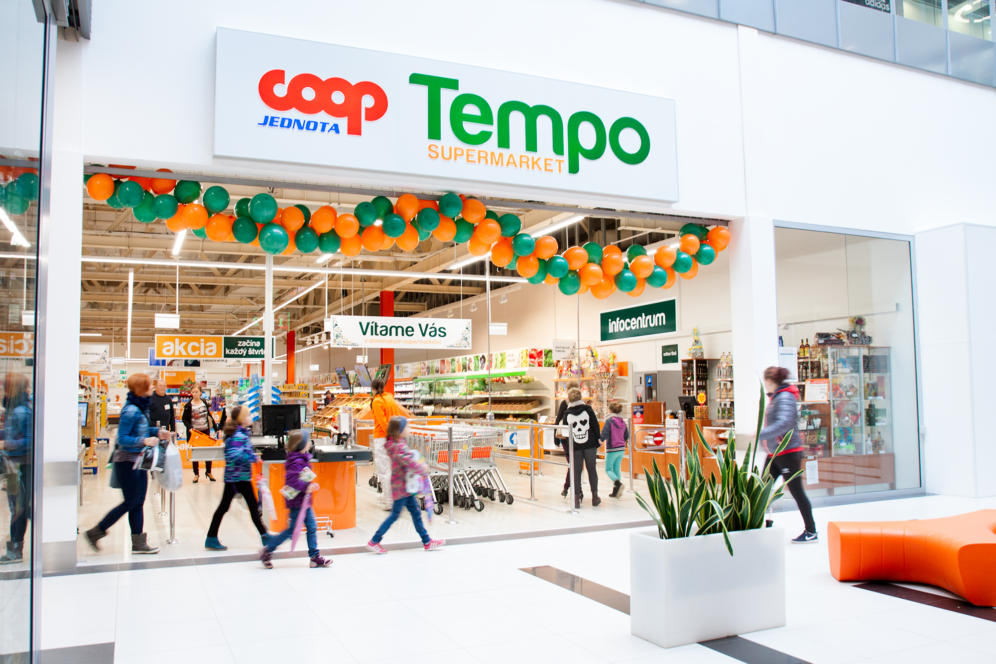 Prevádzka COOP Jednota Trenčin